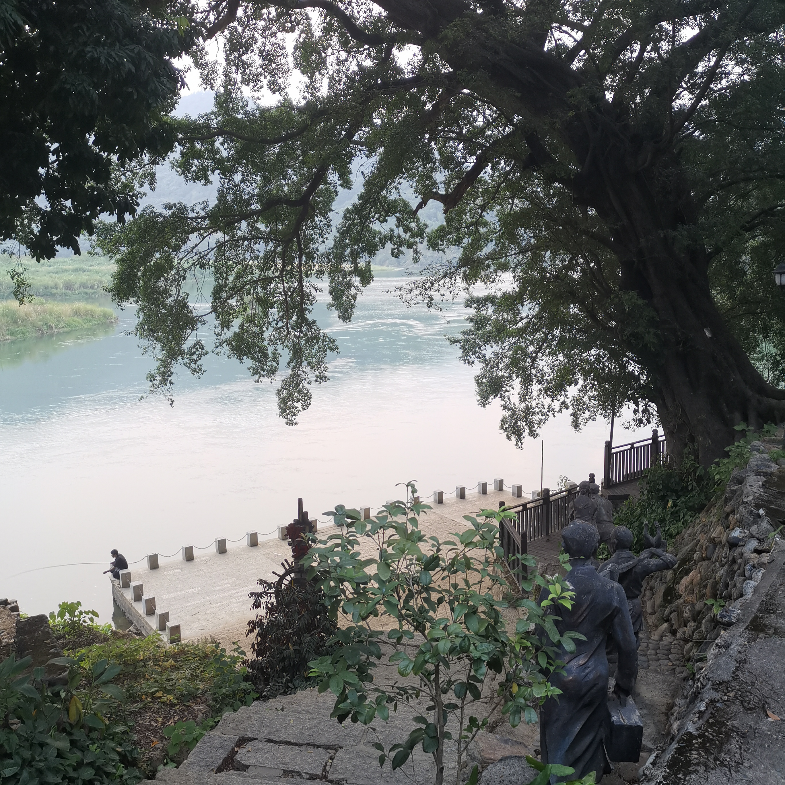 中文（中国大陆）: 古新圩渡口